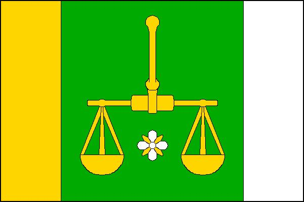 Vlajka obce Oborná